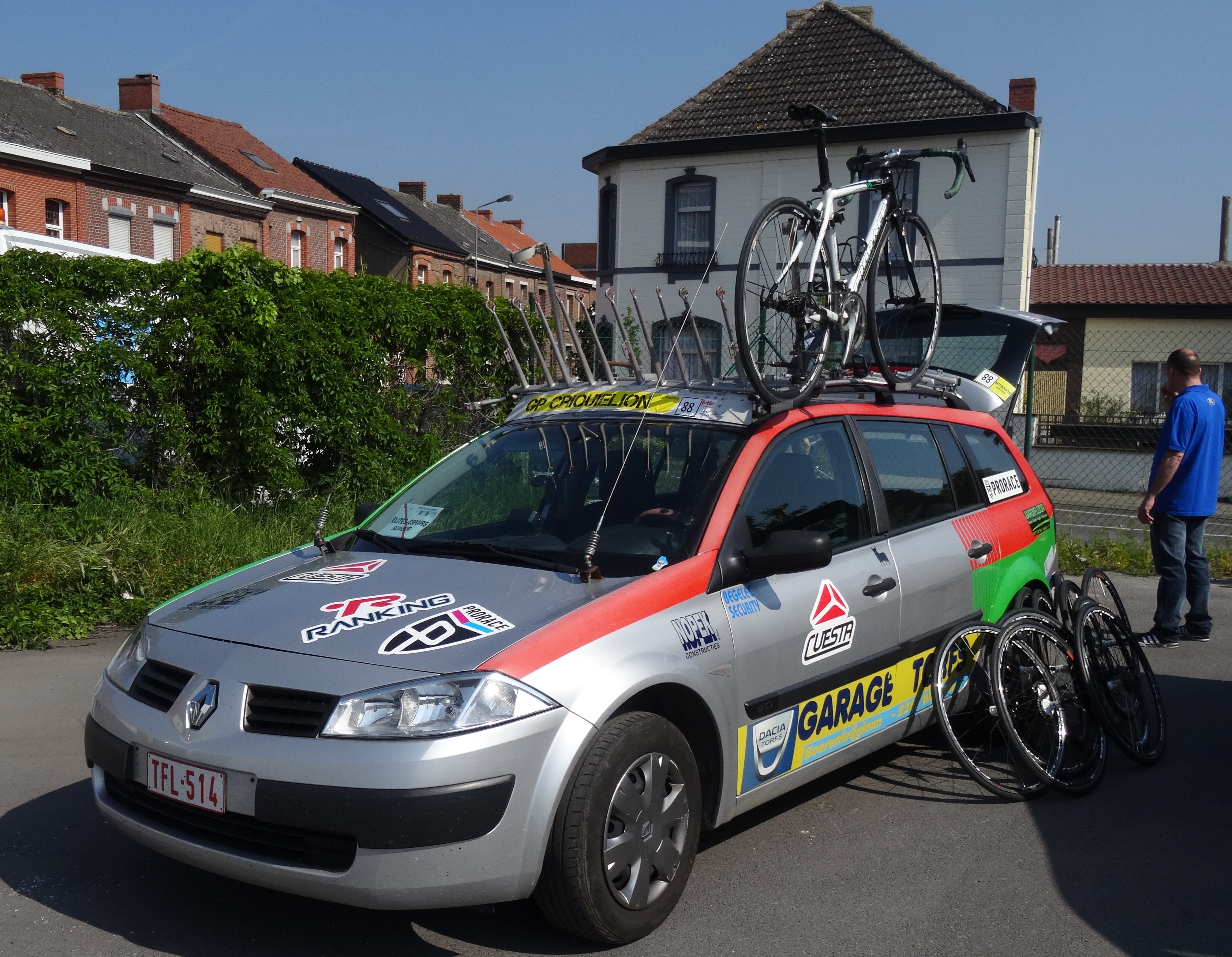 Reportage réalisé le samedi 17 mai à l'occasion du départ du Grand Prix Criquielion 2014 à Boussu, Belgique.